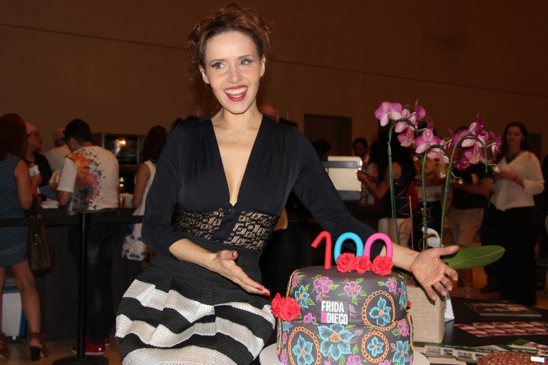 Leona Cavali